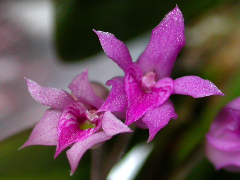 Meiracyllium wendlandii